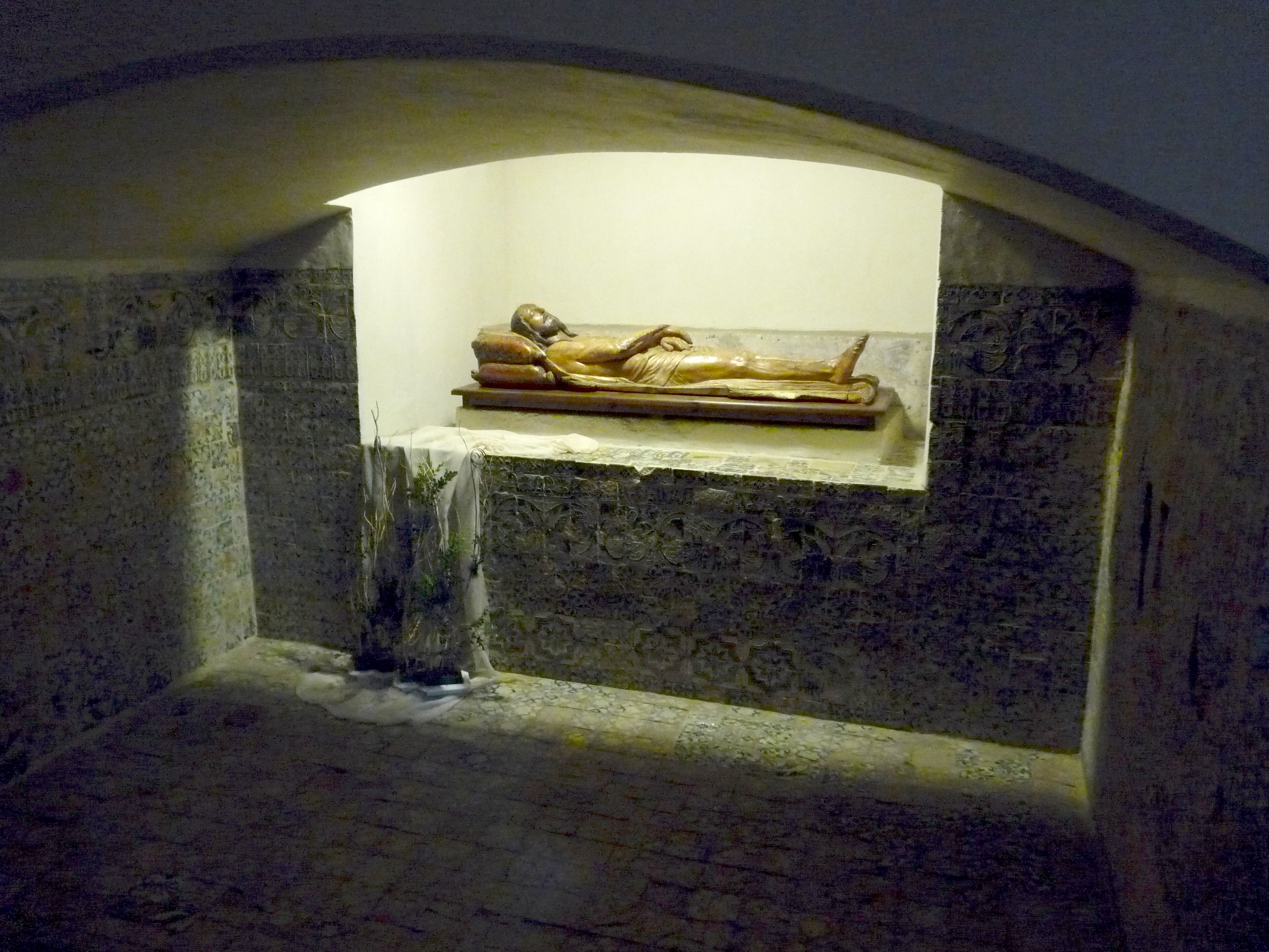 Zaragoza - Convento del Santo Sepulcro s. XIII-XIV - Sala capitular - Santo Sepulcro